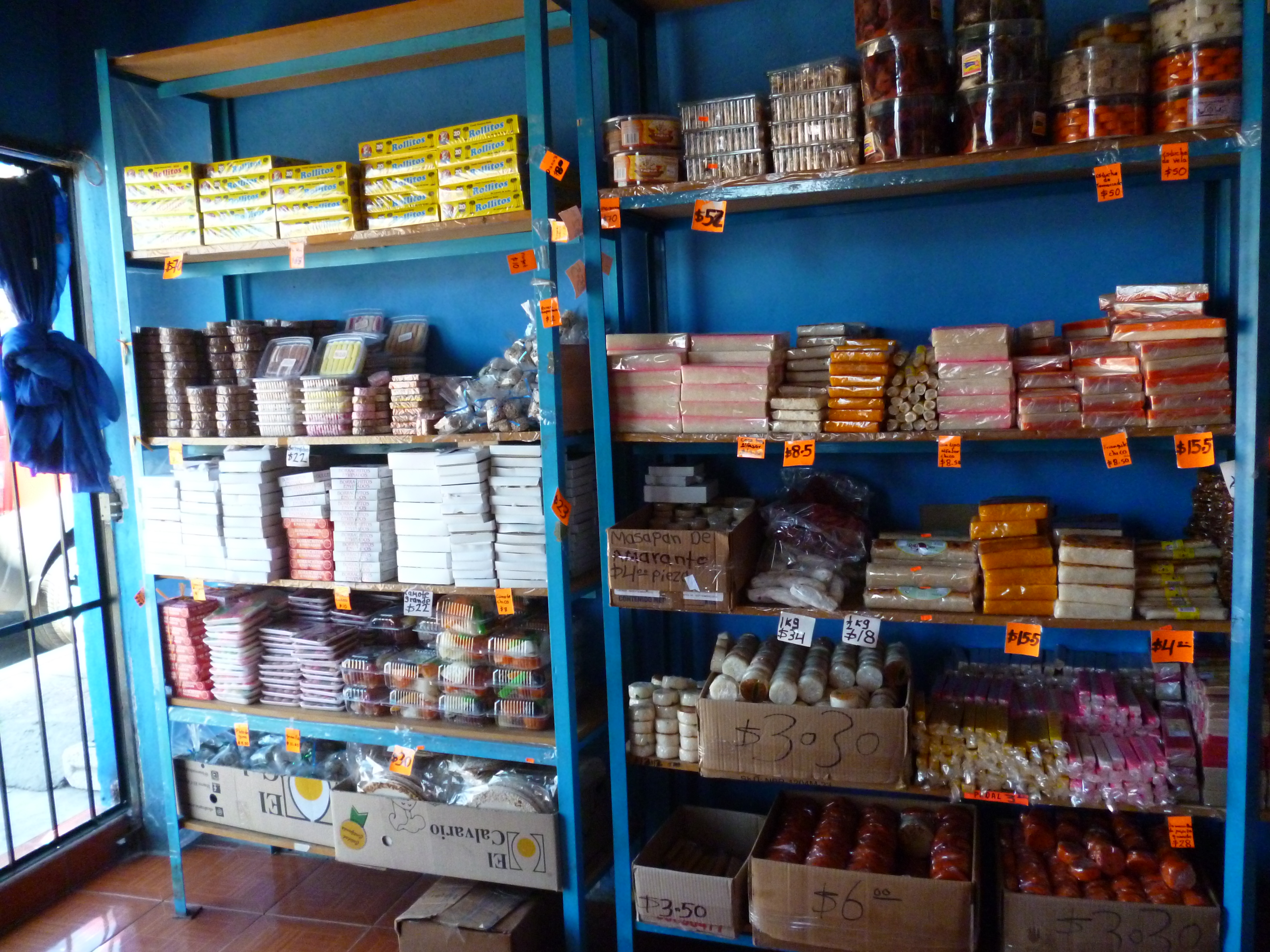 estantes con amaranto y palanquetas en una tienda de confituras a las afueras de Temoac, Morelos, México